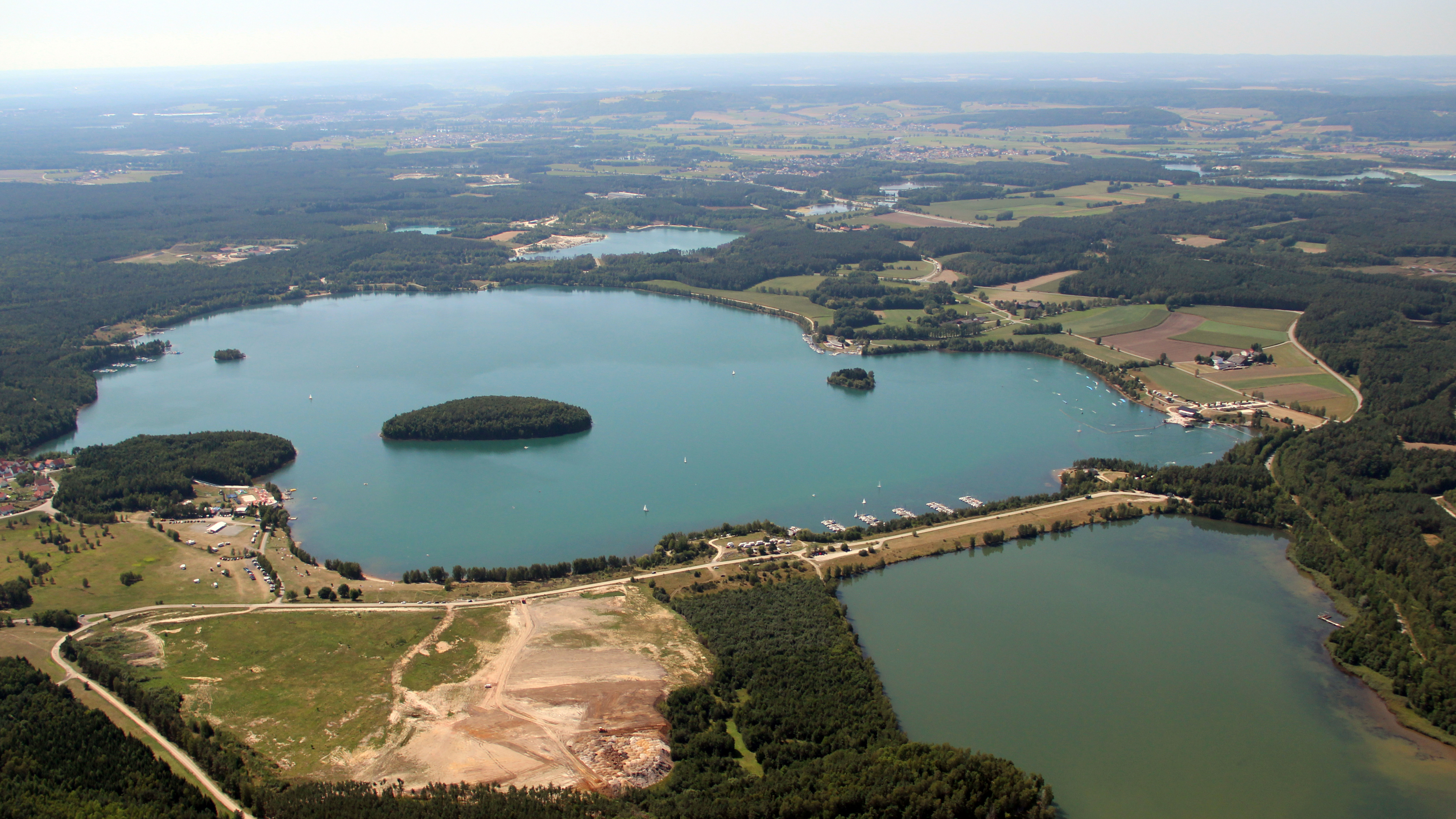 Steinberger See im Oberpfälzer Seenland, Landkreis Schwandorf, Oberpfalz, Bayern (2012)